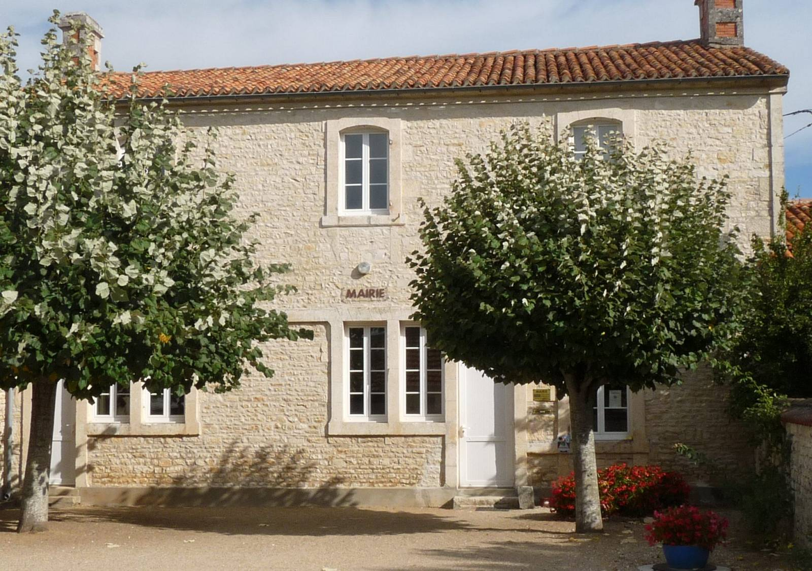 mairie de Chenommet, Charente, France